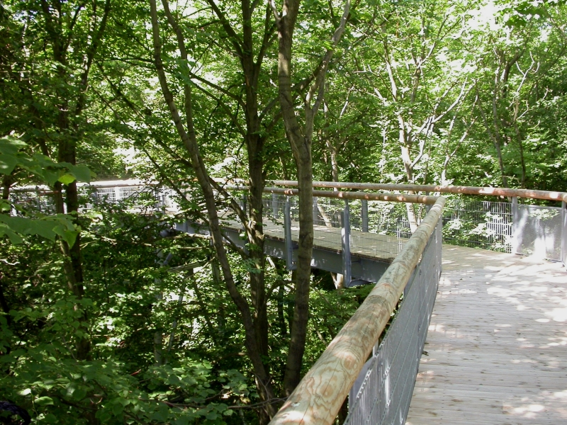 Nationalpark Hainich, Thüringen, Baumwipfelpfad, Germany